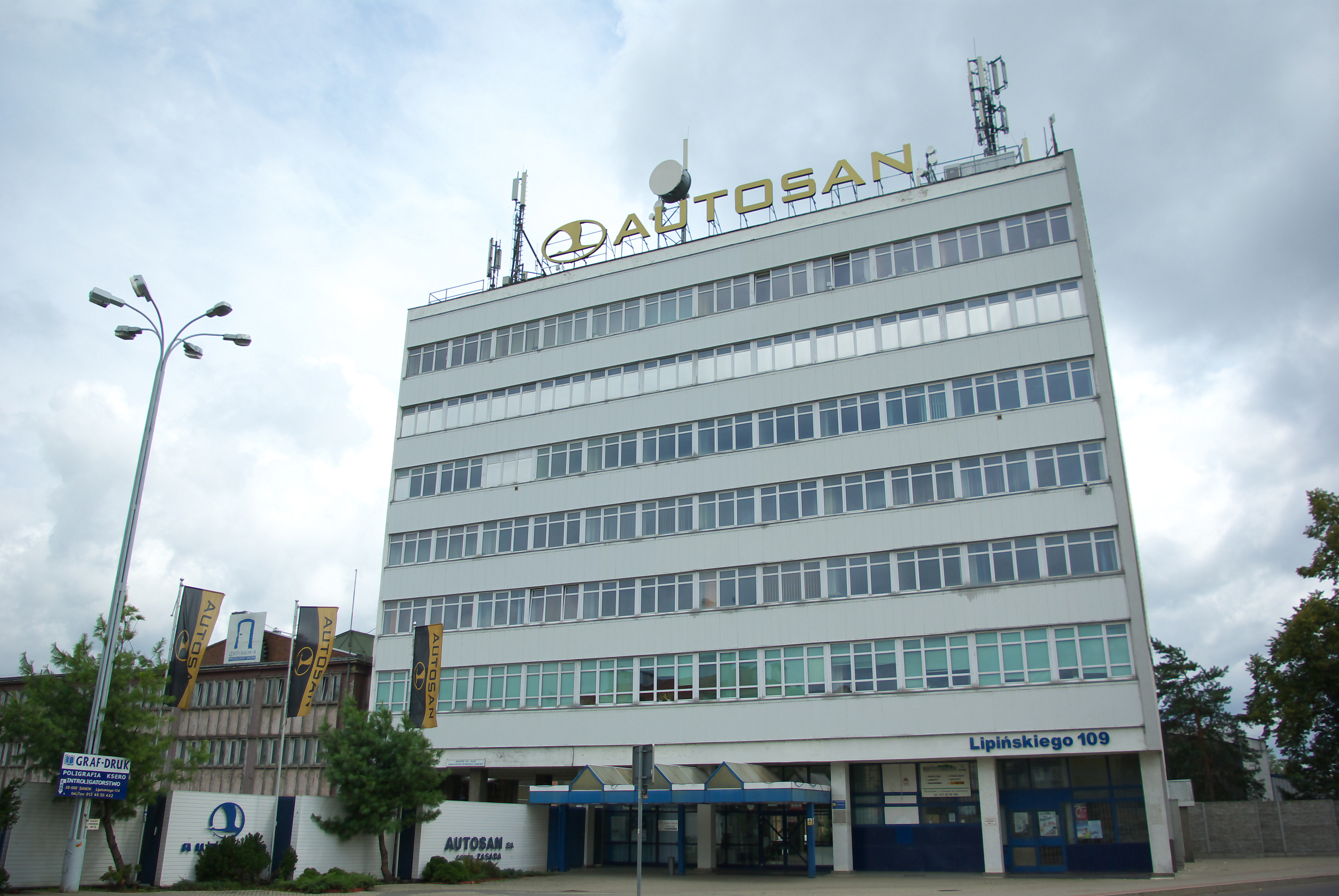 Budynek Autosanu Lipińskiego 109 Sanok